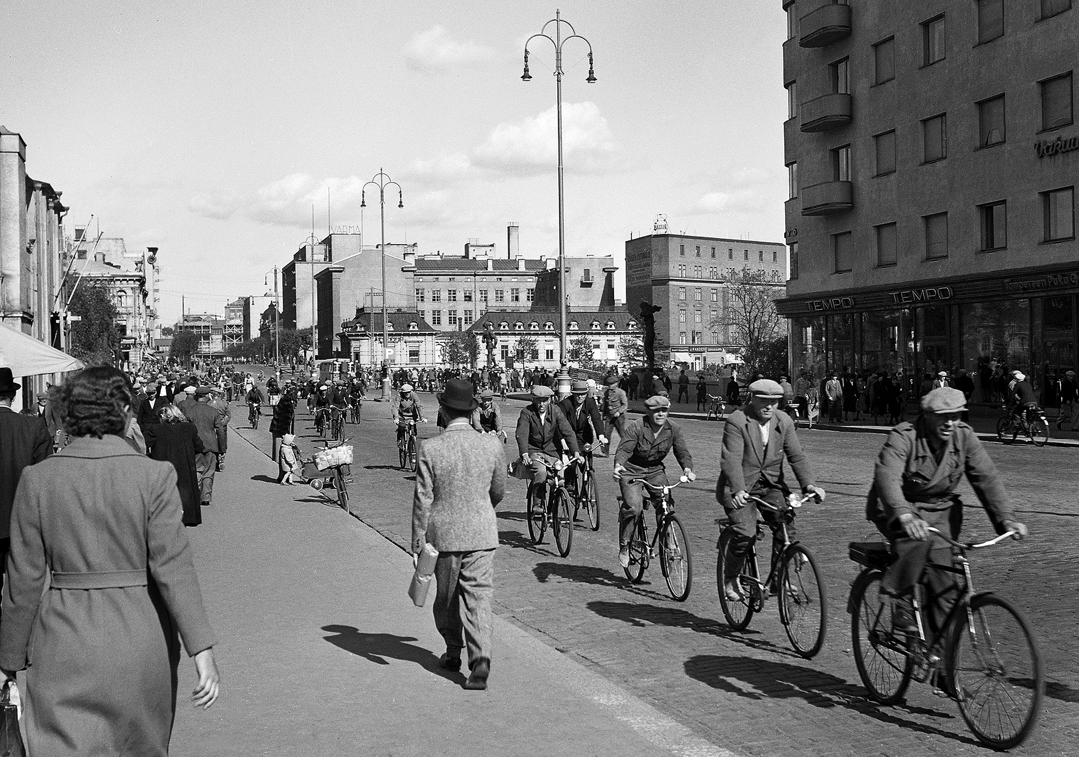 Polkupyöräilijöitä ja jalankulkijoita Tampereen Hämeenkadulla